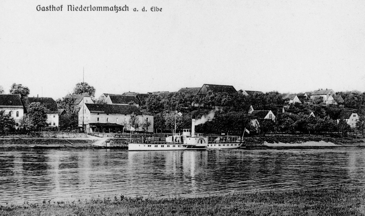 Niederlommatzsch; Gasthof mit Elbe und Dampfer Mühlberg This postcard is from publisher Brück & Sohn in Meißen ( postcard has a unique number 25367 and is available in a higher resolution at the publisher. This images was uploaded in a cooperation project between Wikipedians and the publisher.